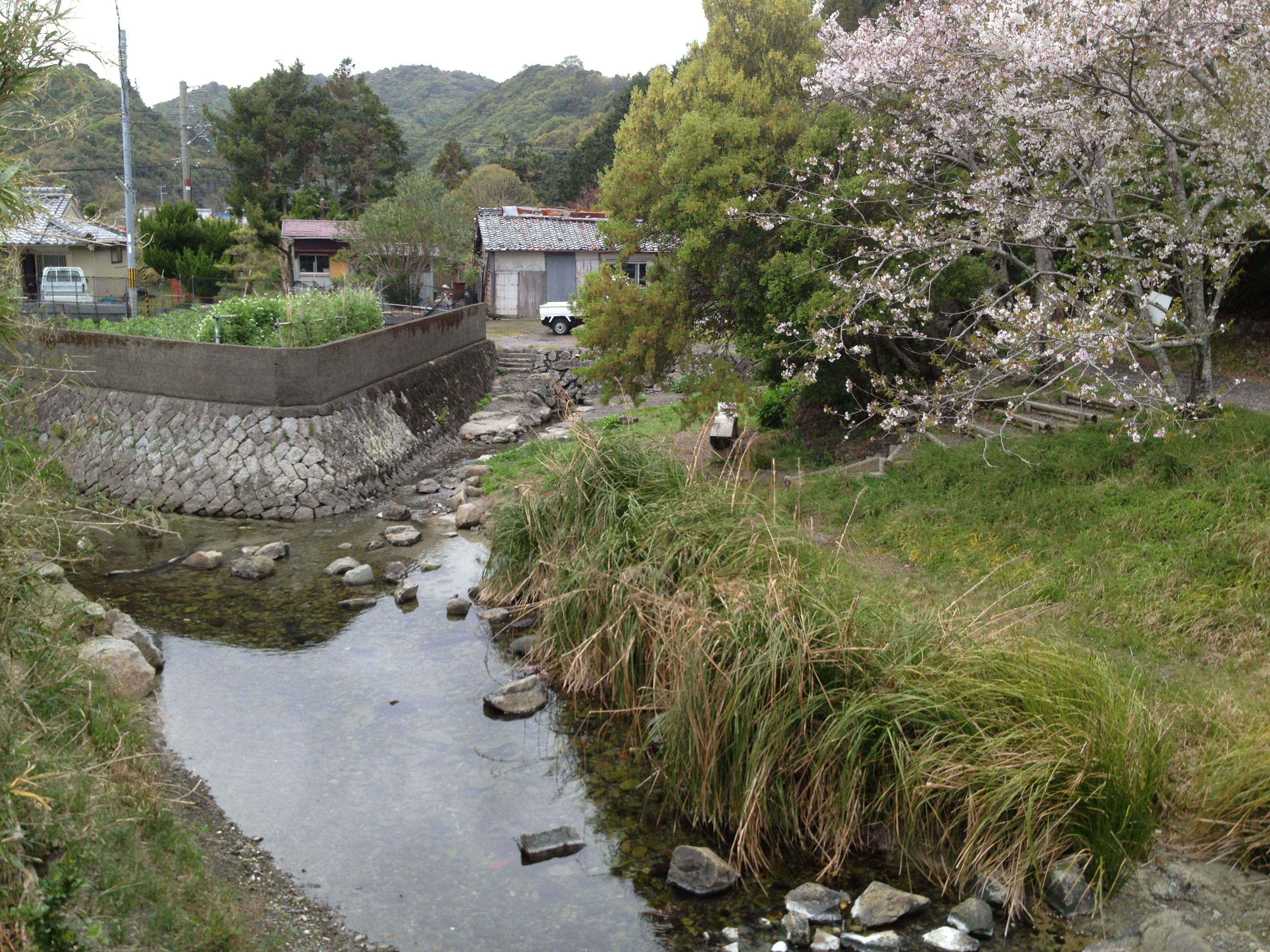 ぶつぶつ川全景